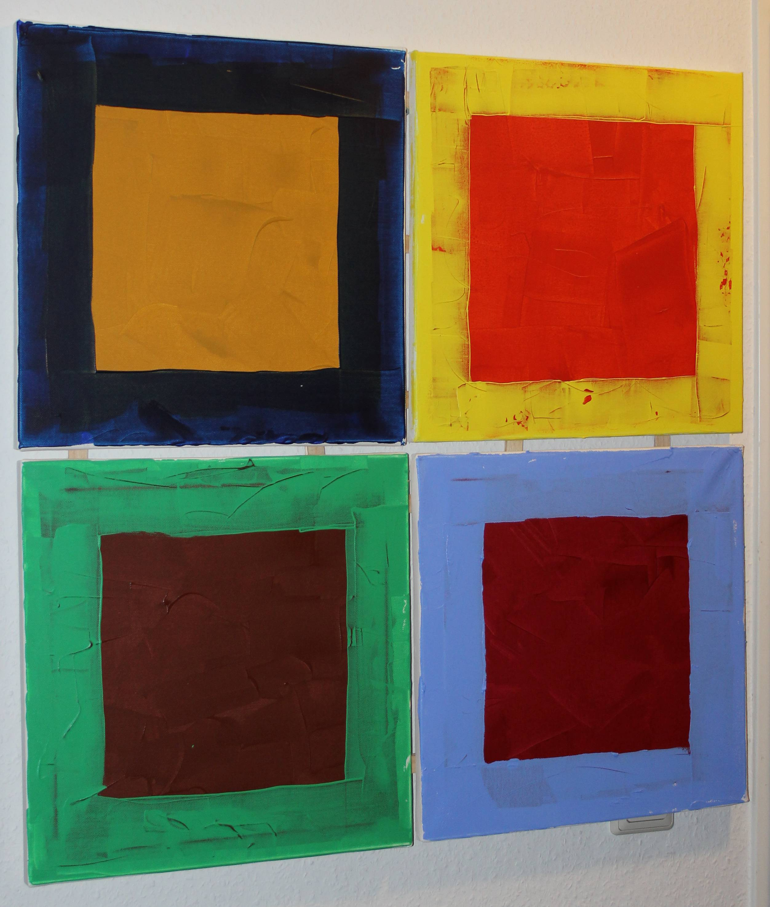 Farbfeldmalerei